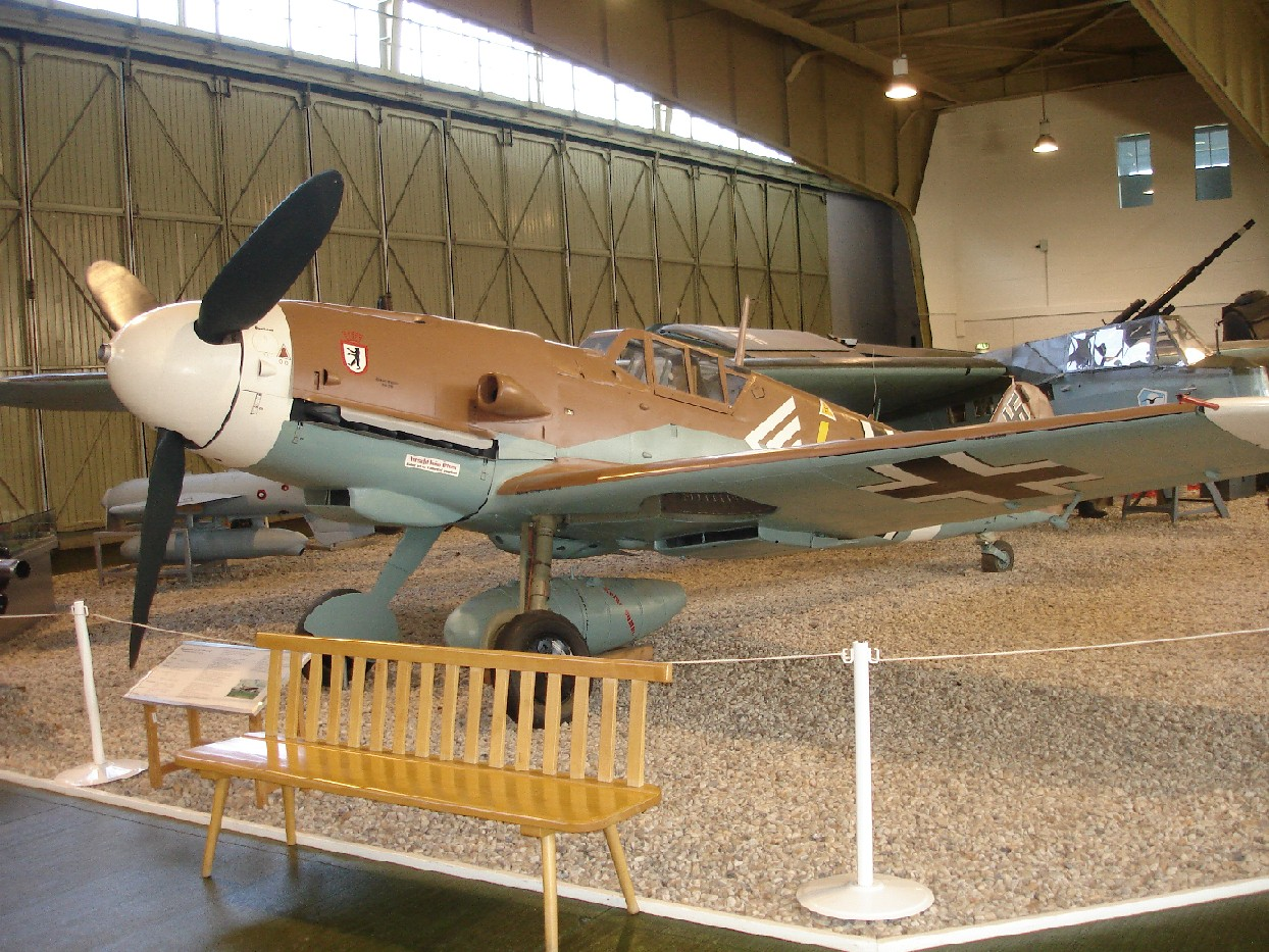 Gustav Rödel Bf 109 G-2 remake in the Luftwaffenmuseum in Berlin